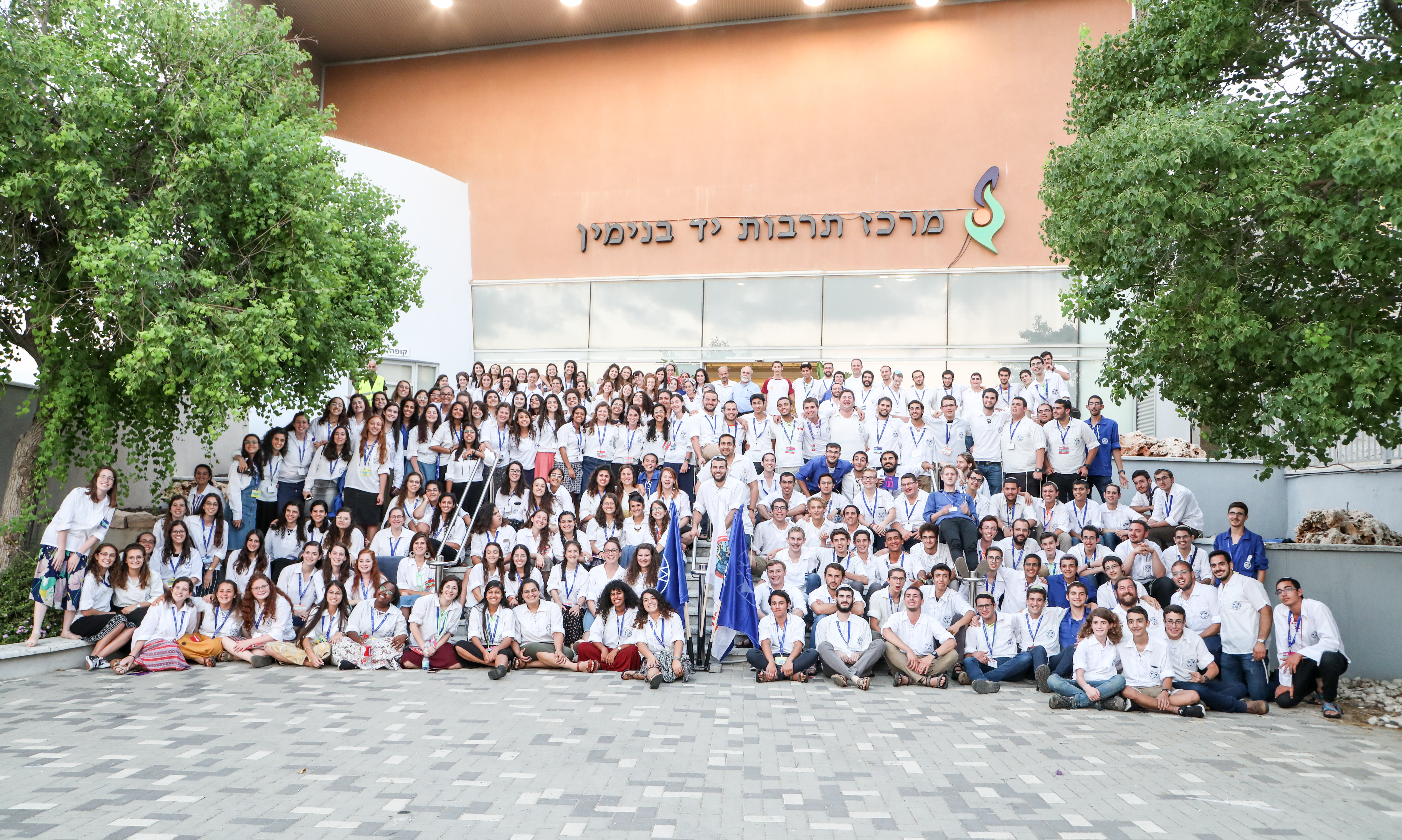 תמונה משותפת של כלל צירי הועידה בועידת ה-100 - 2019